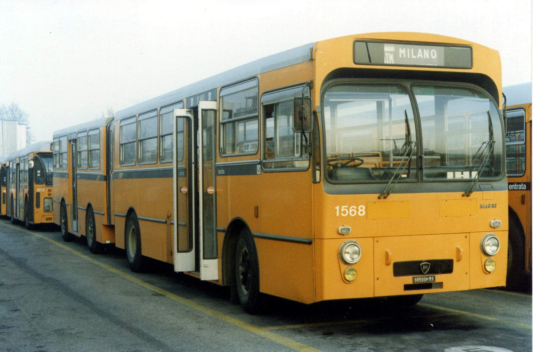 Lancia 703 Mauri 1568